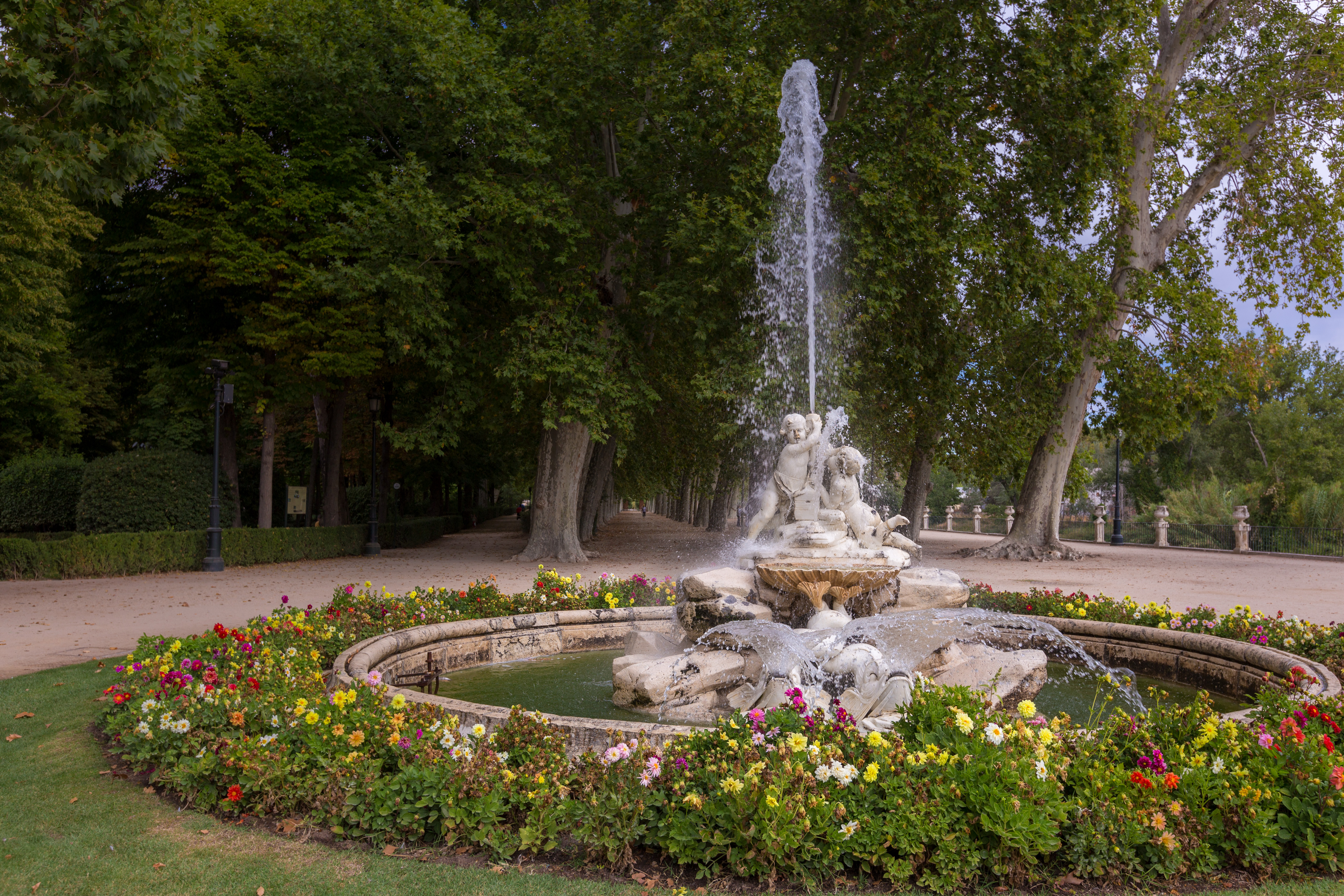 Fuente de la Boticaria, en el Jardín de la Isla, Aranjuez.